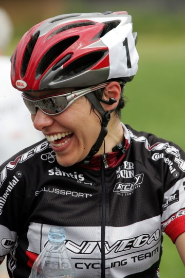 Sereina Trachsel, Schweizermeisterin 2005